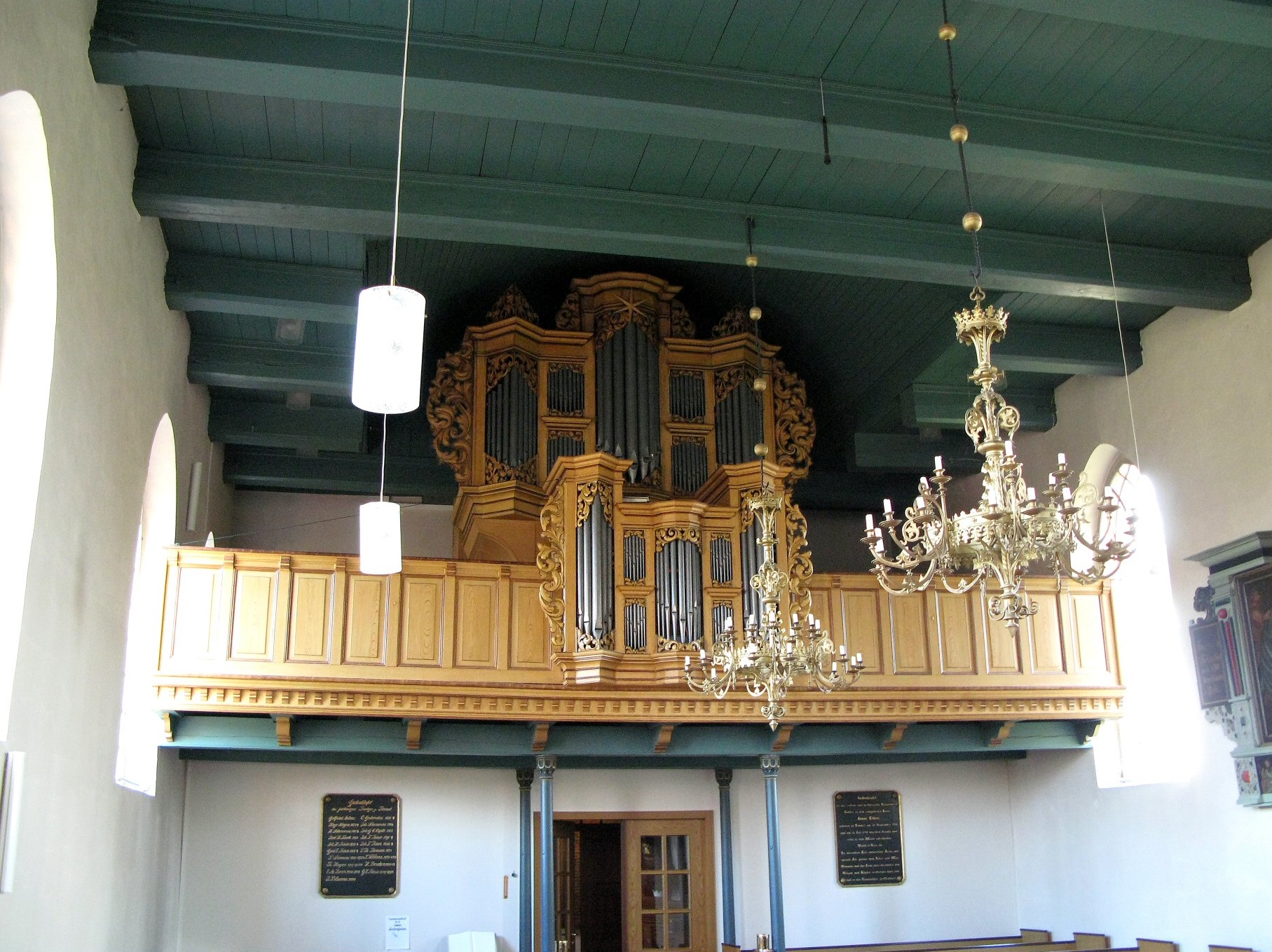 Orgel in Timmel, Landkreis Leer